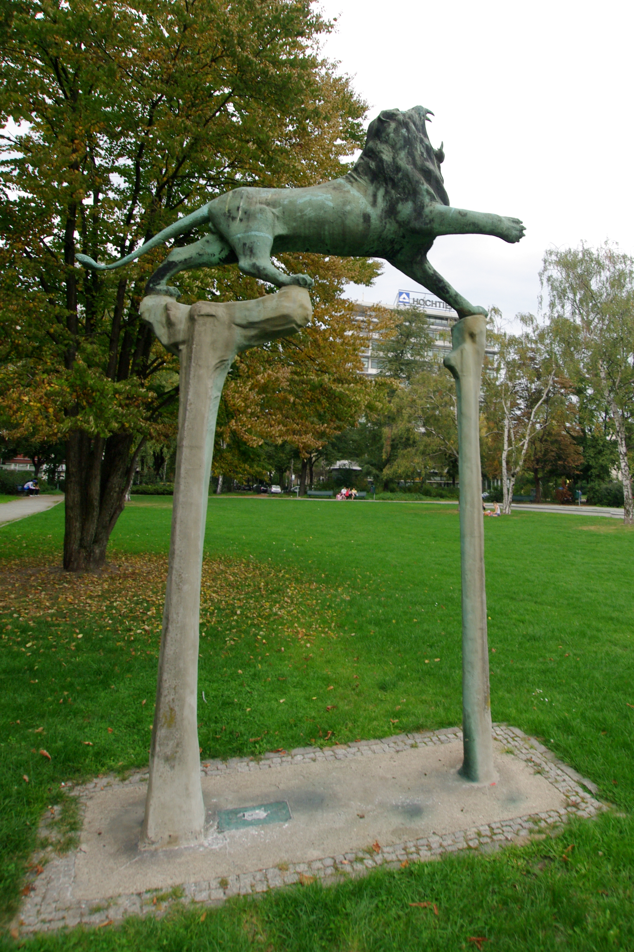 Löwendenkmal auf dem Bayrischen Platz. 1952 von Anton Rückel